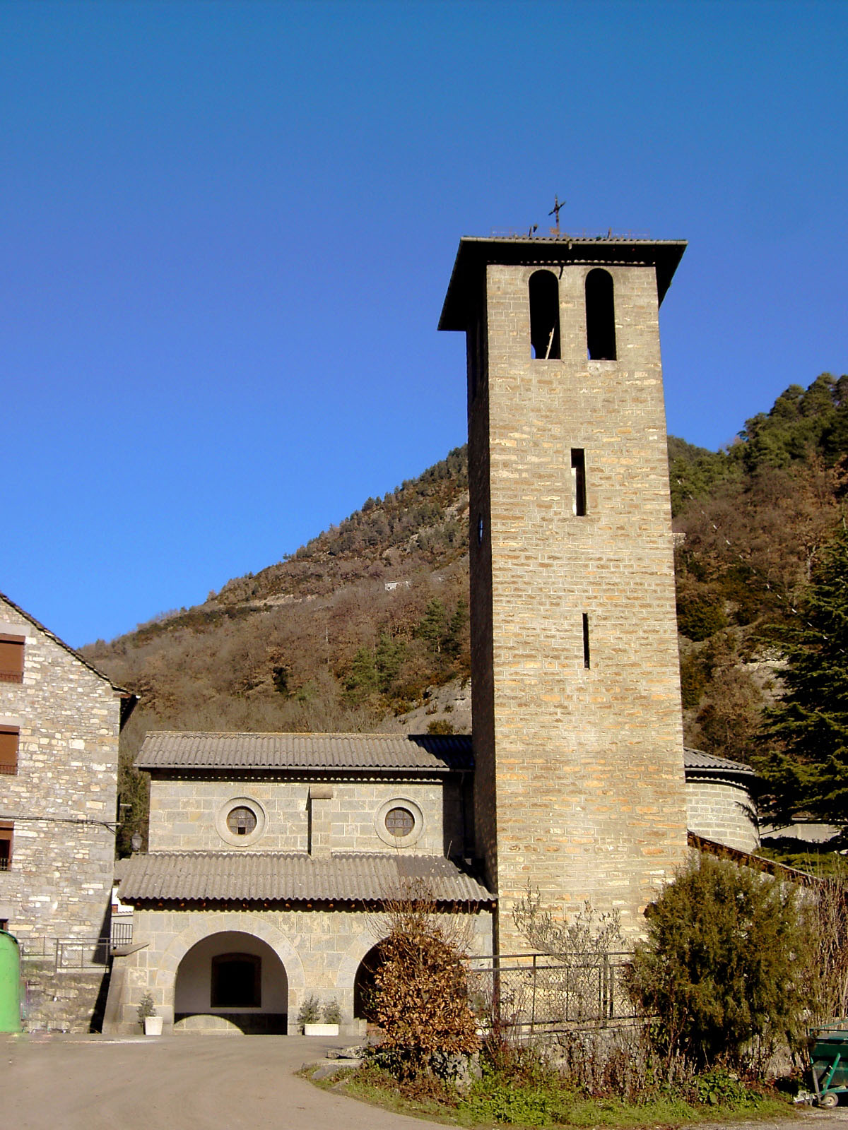 La iglesia de Sarvisé, pueblo llamado Saruisé o Saruiset en lengua aragonesa y que pertenece al Valle de Broto.